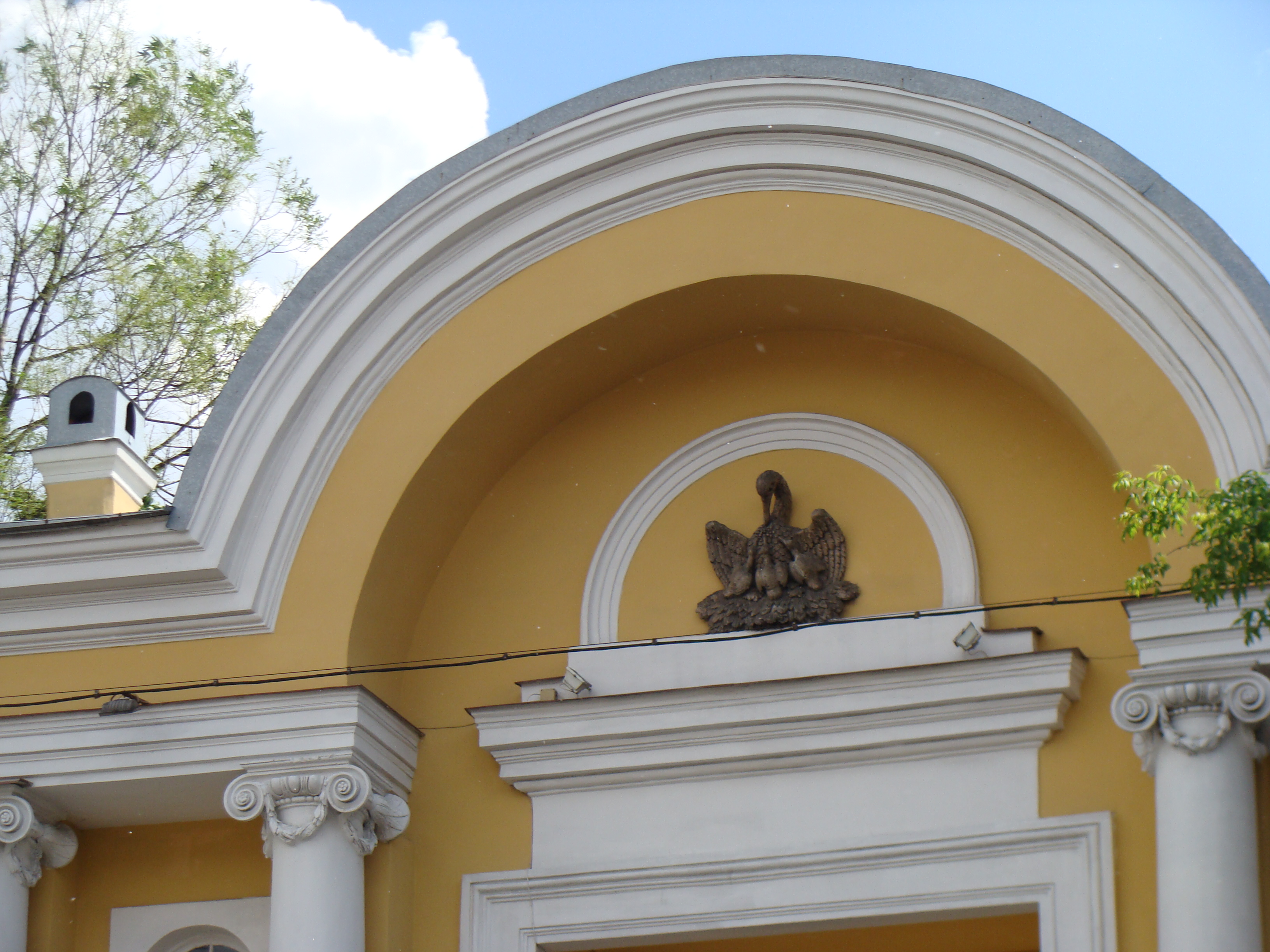 Барельеф Пеликан у РГПУ